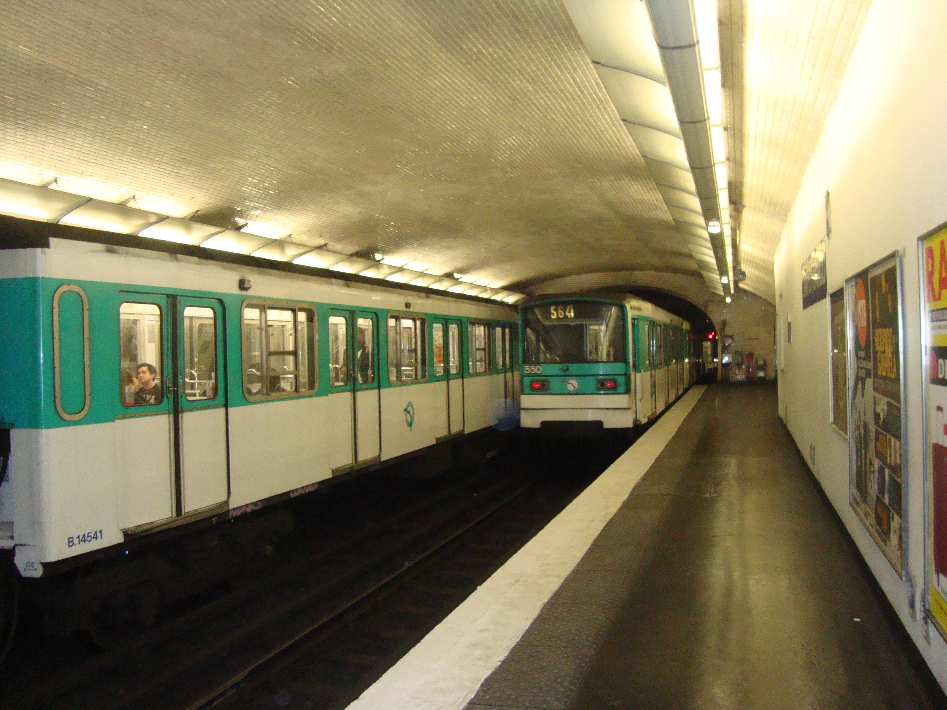 Des rames à la station de métro Campo Formio sur la ligne 5 du métro de Paris.